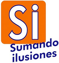 Logotipo de la Coalición SI por Salamanca